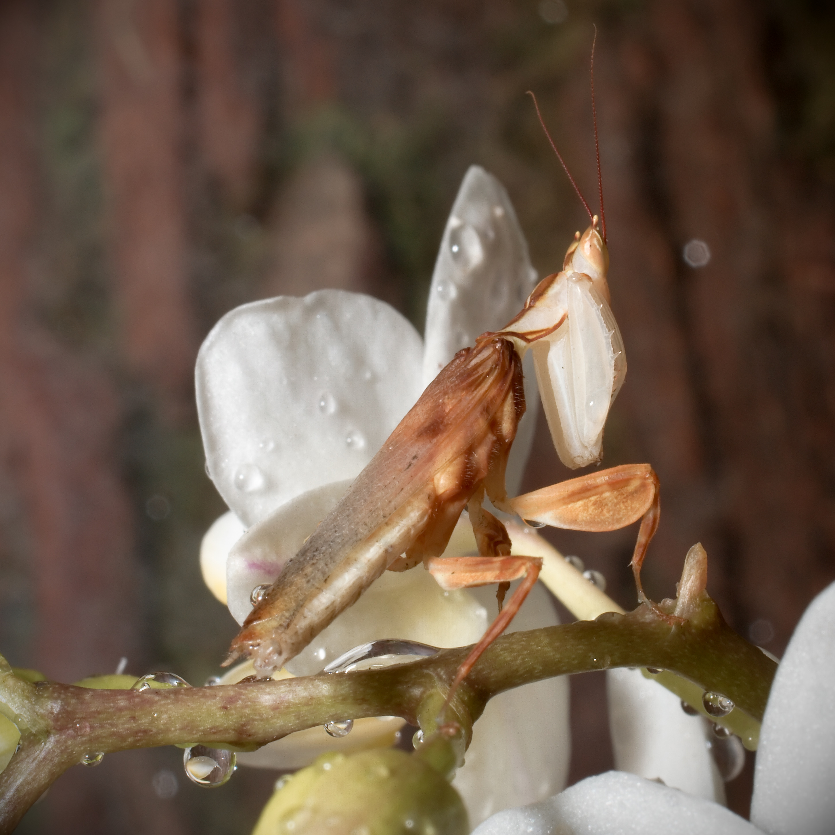 Bloembidsprinkhaan